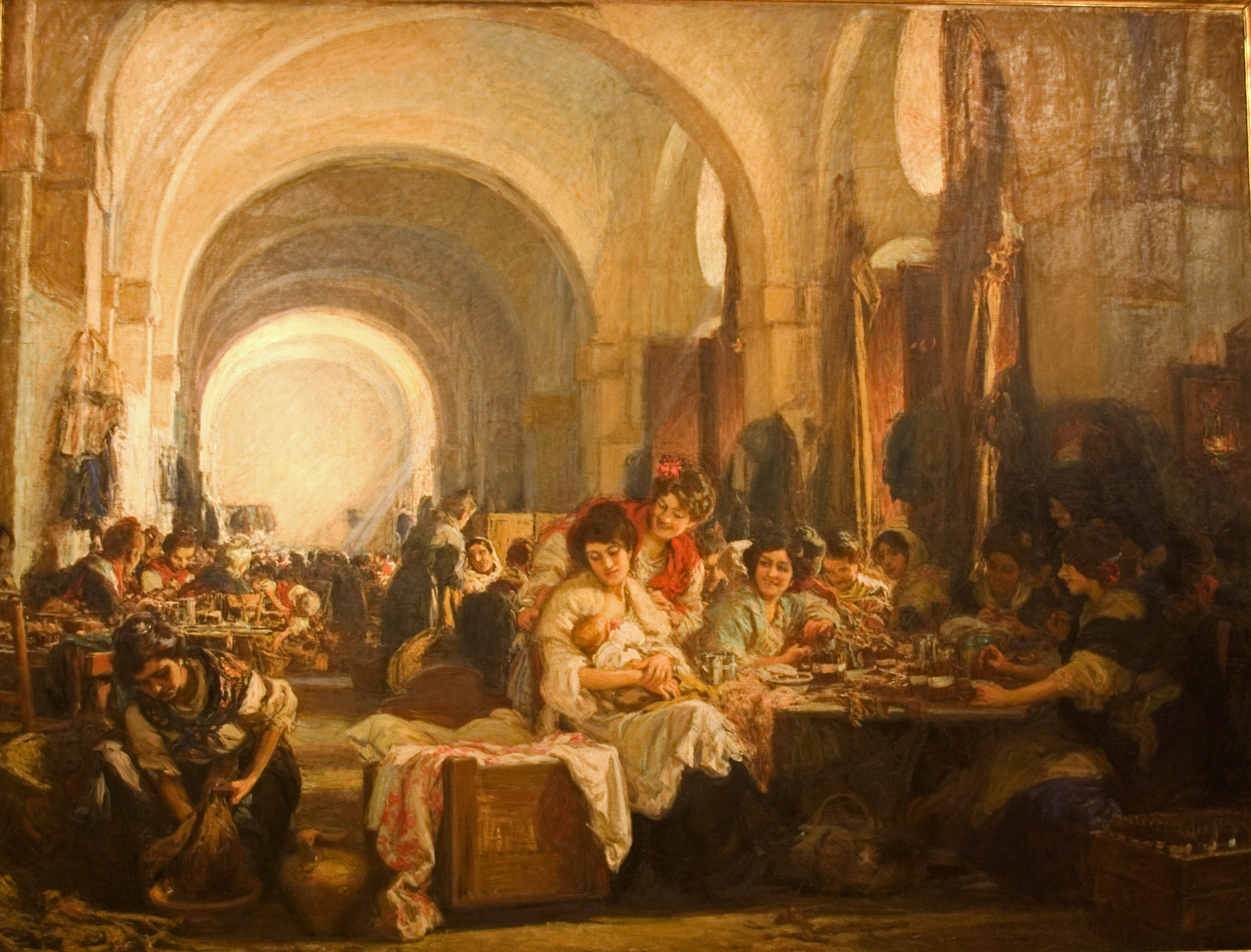 Las Cigarerras, obra de Gonzalo Bilbao (1915) Dimensiones: 305 x 402 centímetros